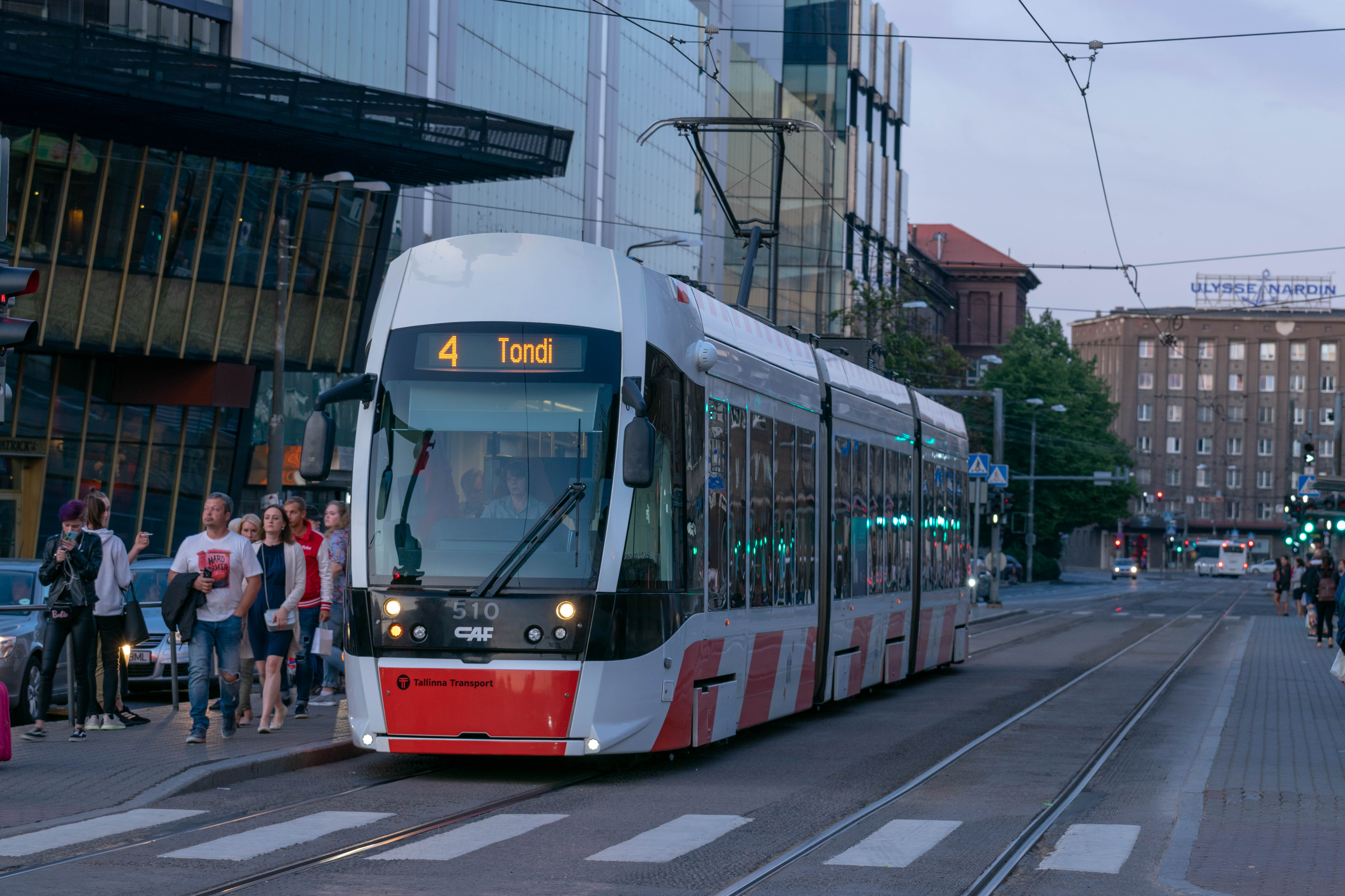 CAF Urbos AXL n°510, Tallinn (2019)